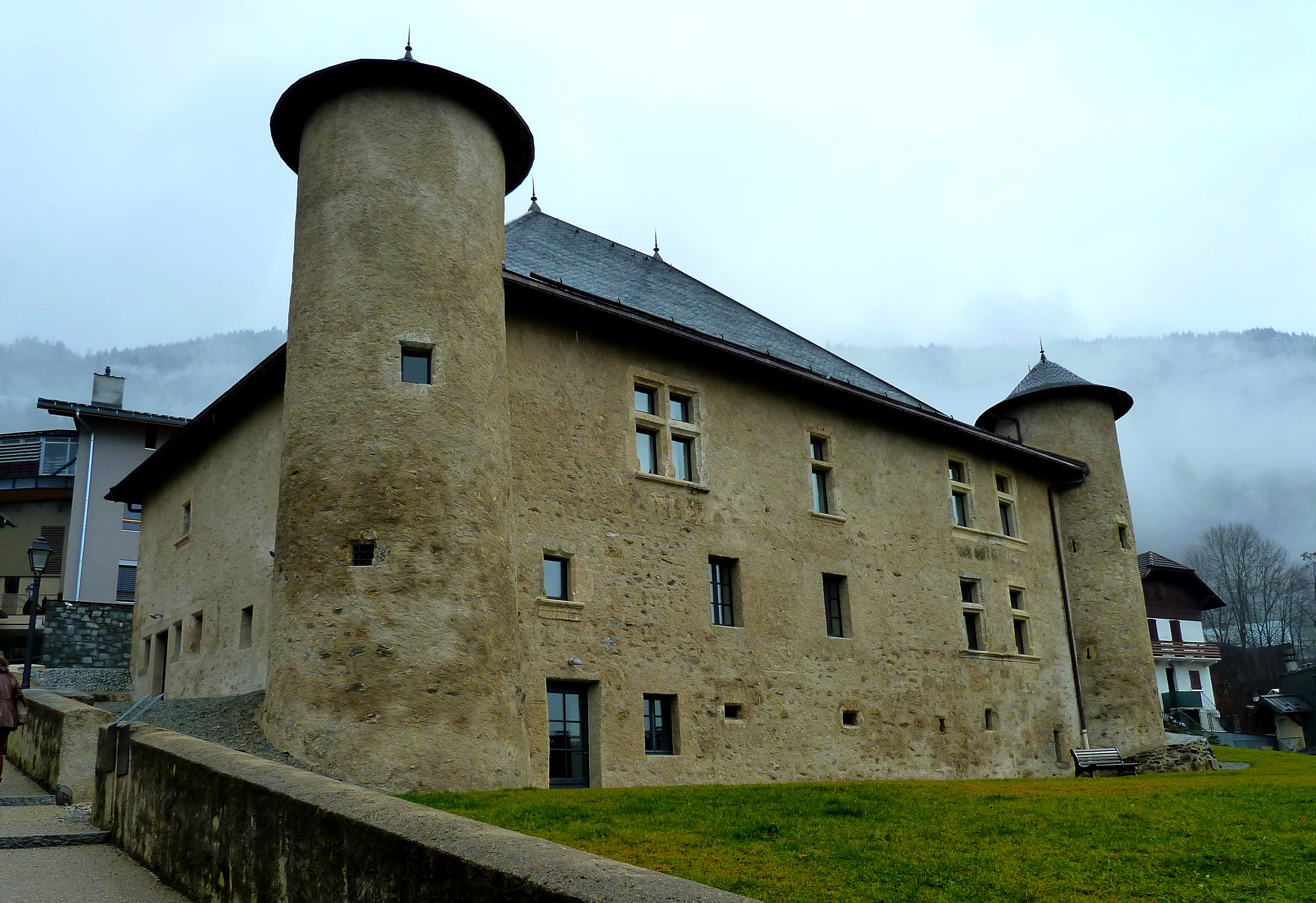 Maison forte dite de Haute Tour. Centre du village de Saint-Gervais-les-Bains (Haute-Savoie).